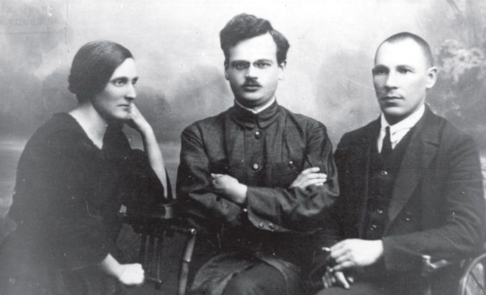 Удзельнікі канферэнцыі прадстаўнікоў беларускіх леварадыкальных арганізацый у Гданьску. Злева направа Палута Бадунова, Леапольд Родзевіч, Язэп Лагіновіч. 1923. БДАМЛіМ